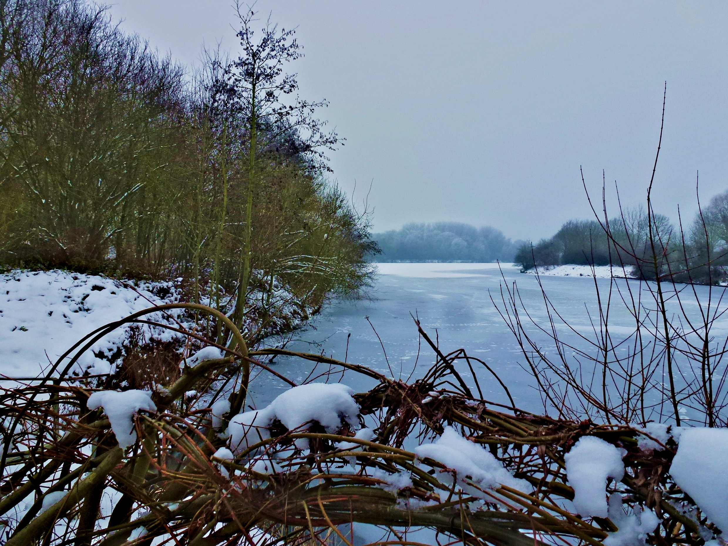 Vue sur lac du Héron partiellement gelé.- Parc du Héron à Villeneuve-d'Ascq